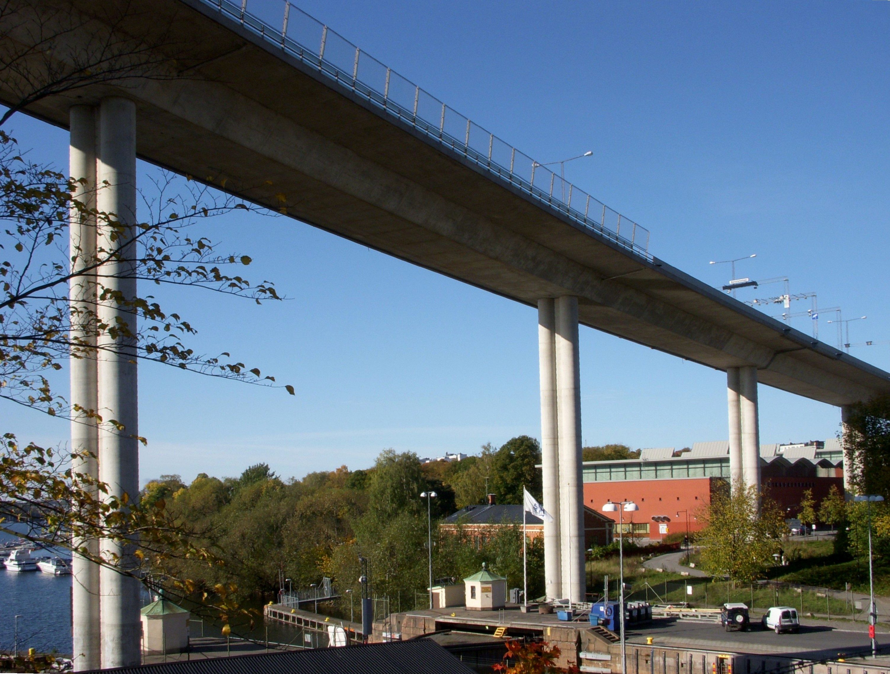 Johanneshovsbron i Stockholm